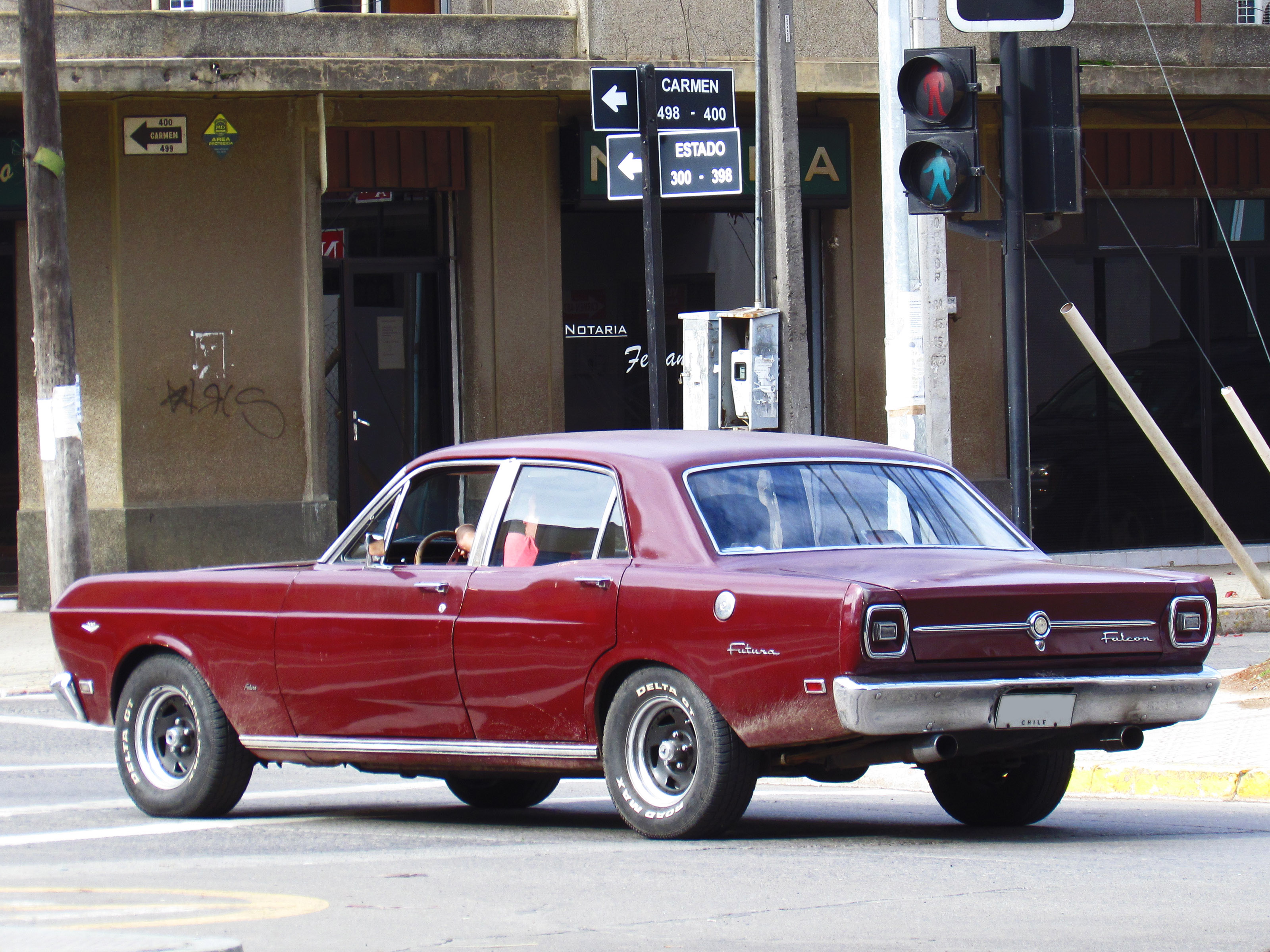 Ford Falcon Futura 289 1970